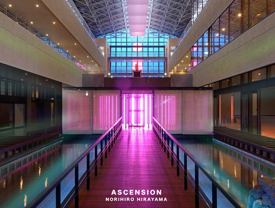 メディアポリス指宿